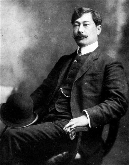 a Japanese painter, 藤島武二 (Fujishima Takeji)